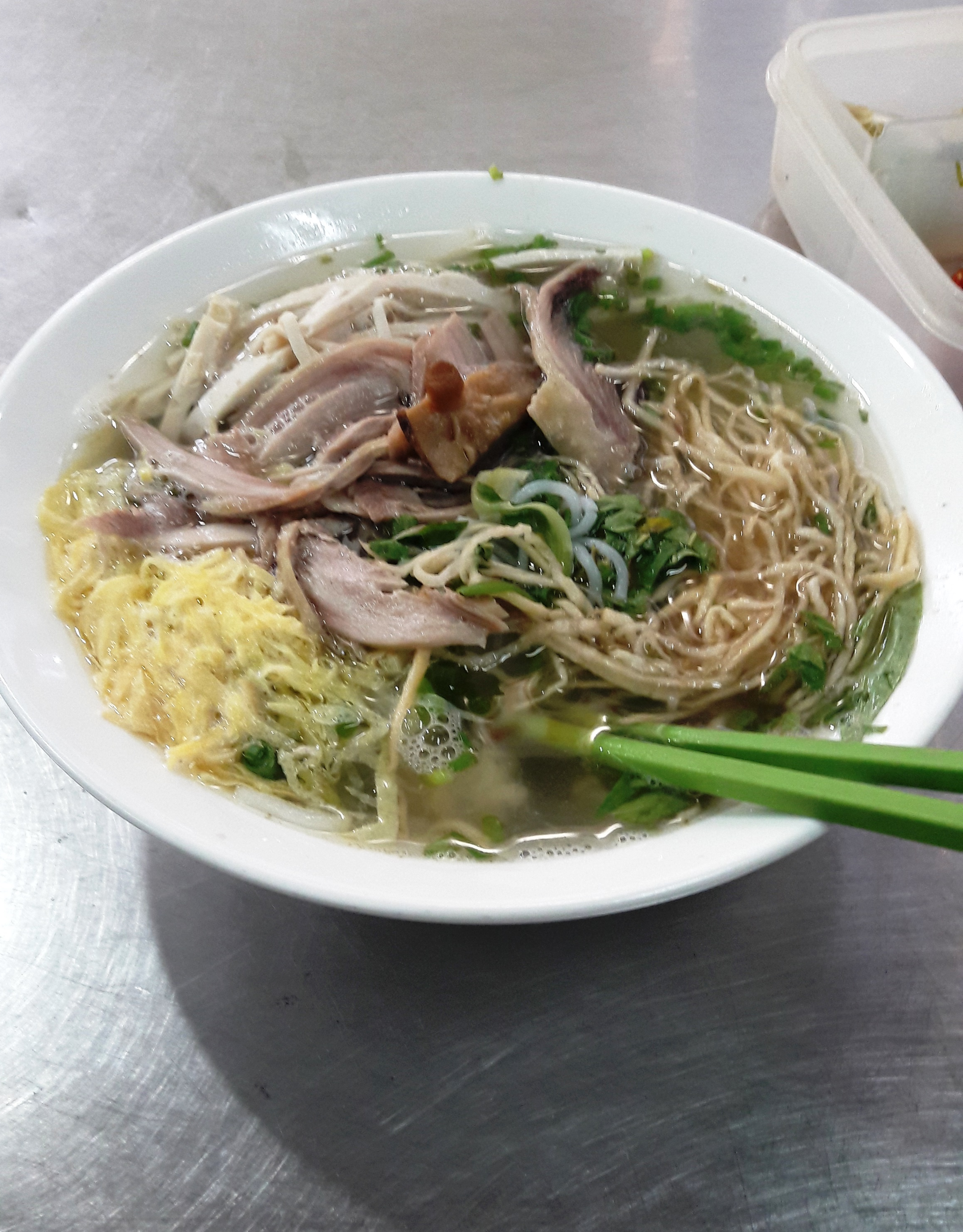 Cuisine of Vietnam